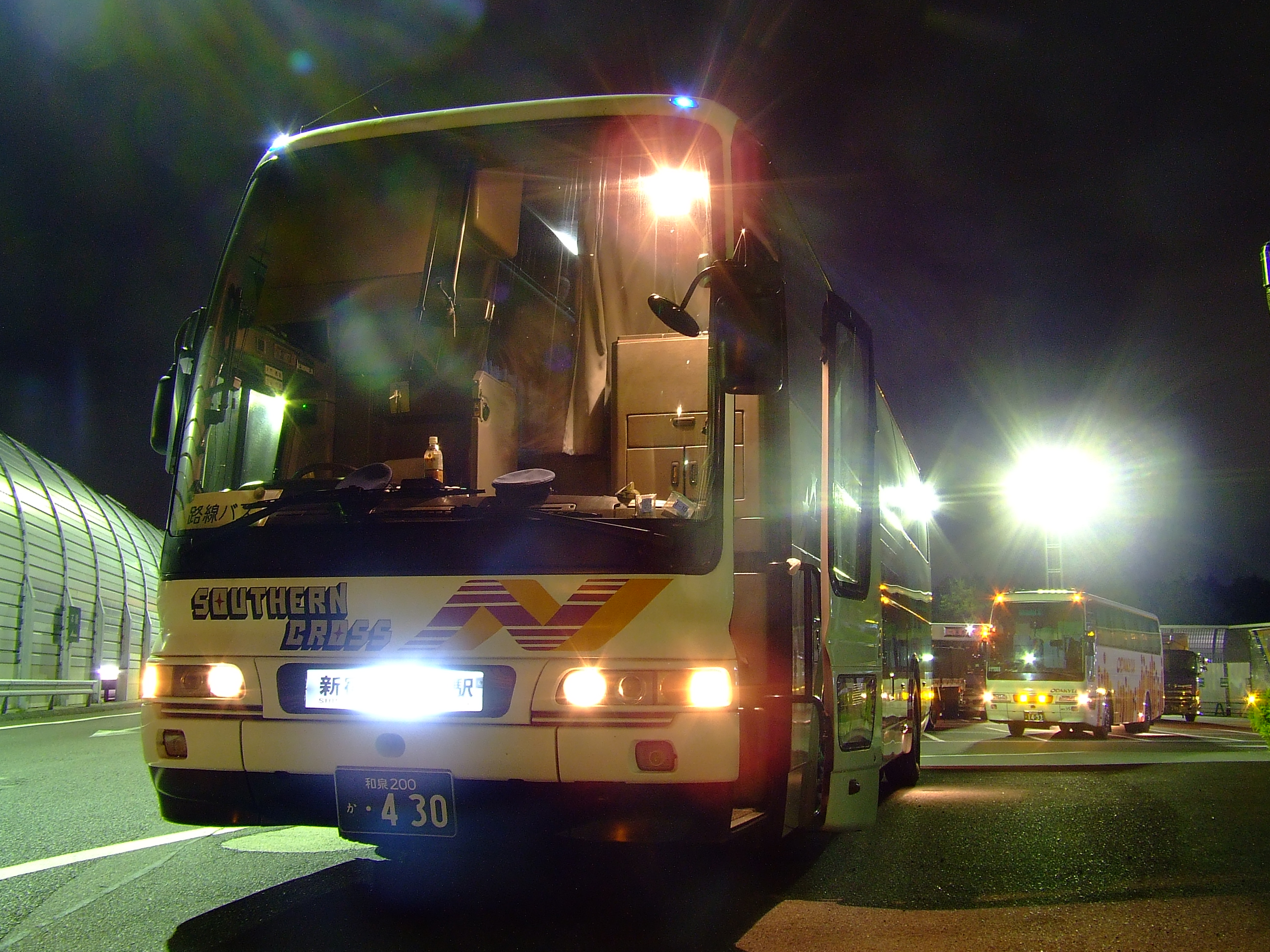 南海ウィングバス南部の夜行高速バス「ドリーム和歌山／サザンクロス号」 草津PAにて